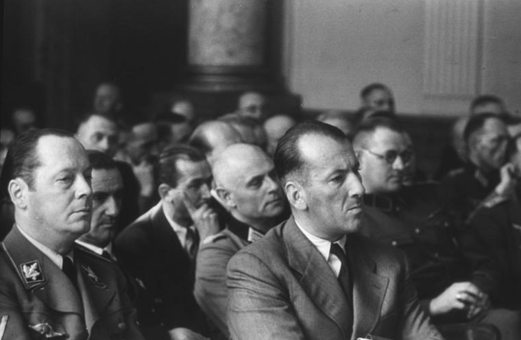 Volksgerichtshof, Dr. Ernst Kaltenbrunner Berlin.- Volksgerichtshof, Prozess nach dem 20. Juli 1944, Zuschauer, 2.v.l. Dr. Ernst Kaltenbrunner. Ca. 15 Monate später zum Tod durch den Strang verurteilt und am 16. Oktober 1946 in Nürnberg hingerichtet. Inhaltsverzeichnis Abgebildete Personen: Kaltenbrunner, Ernst Dr. jur.: SS, Ritterkreuz (RK), Chef des Reichssicherheitshauptamtes, Deutschland und Hans Hinkel (links) (* 22. Juni 1901 in Worms; † 8. Februar 1960 in Göttingen), Staatsrat in der Uniform eines SS-Brigadeführer, Geschäftsführer Reichskulturkammer, Deutschland